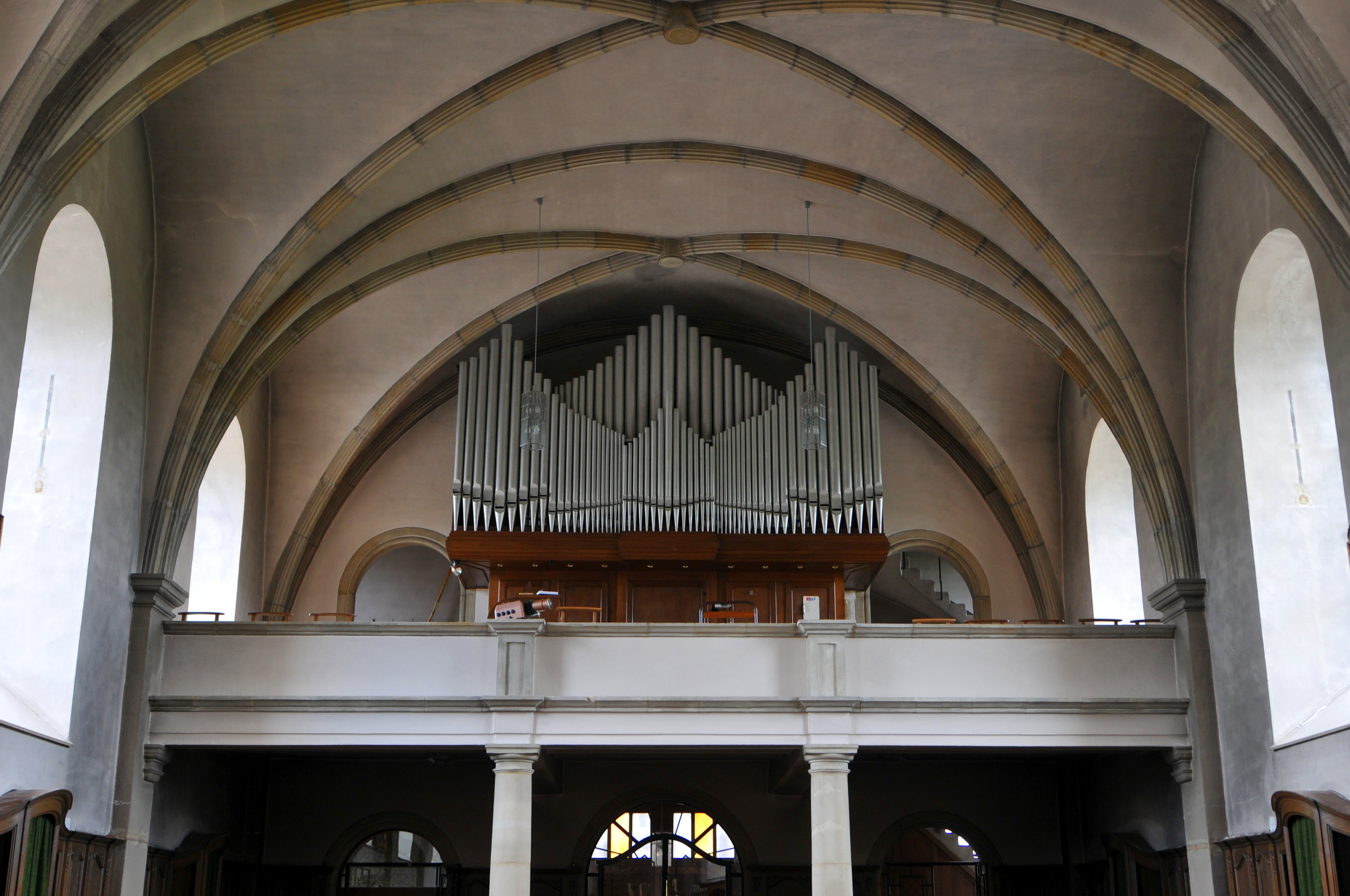 D'Uergel an der Kierch zu Duelem.